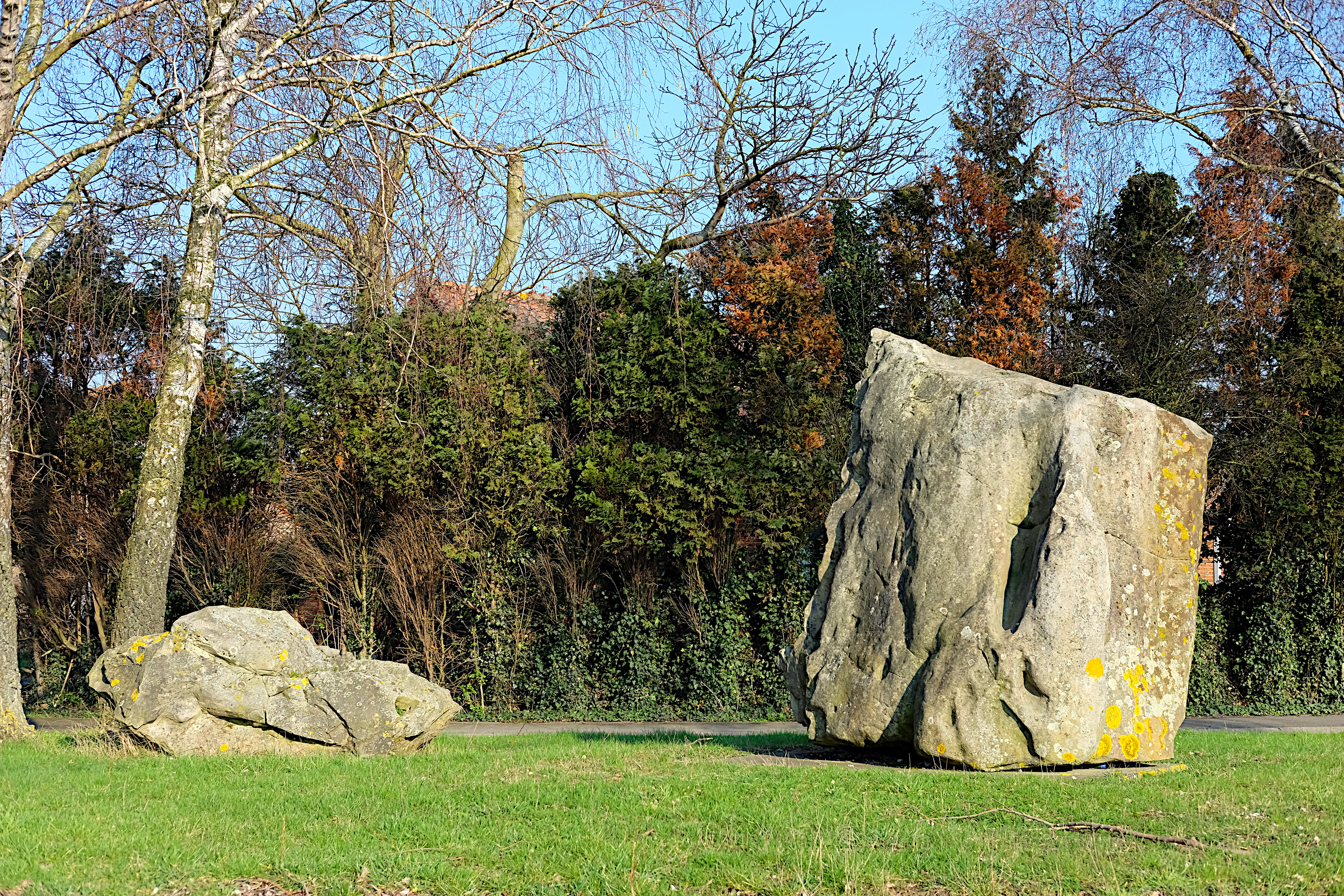 Ces deux pierres font partie d'un ancien ensemble de menhir de l’ère préhistorique. Ils sont déplacée à 750 mètres vers l'est par rapport à l'endroit où ils ont été découverts. Ils se trouvent actuellement au sud-est du cimetière d'Estinnes-au-Val à la sortie de la rue de Bray.